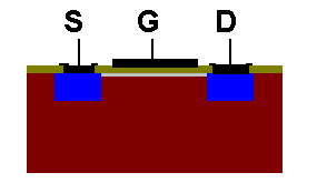 MOSFET eigen productie; GFDL